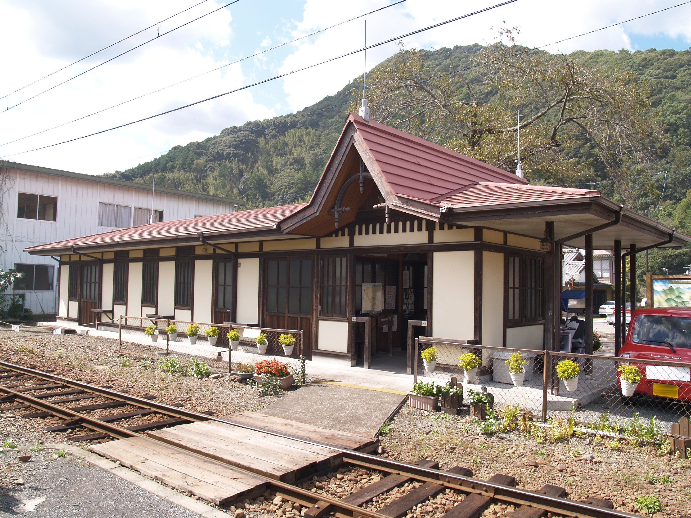 福用駅駅舎（ホーム側から）